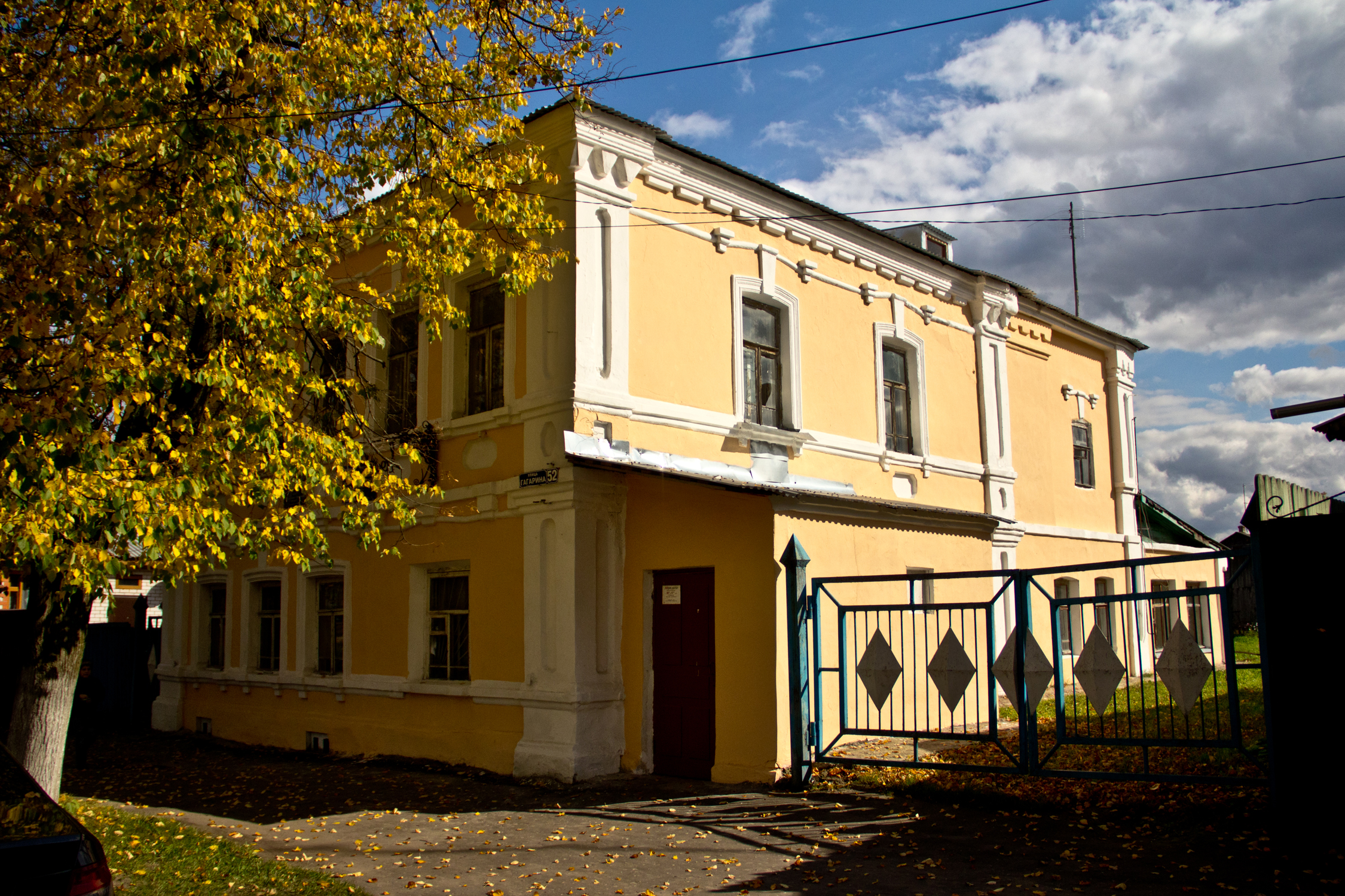 бывший дом Винокуровых-Рябовых